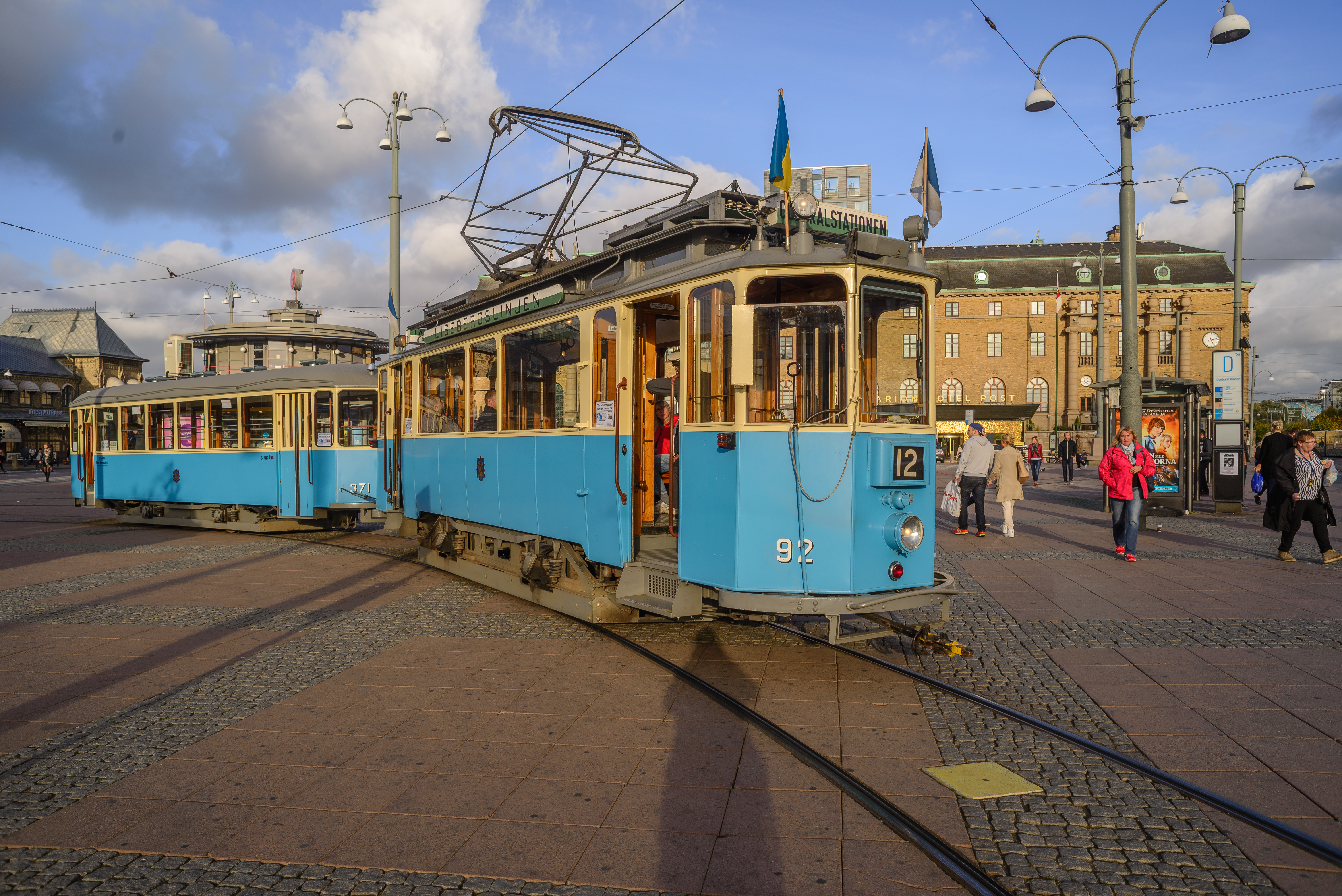 Spårvagnar på Lisebergslinjen (92 och 371) på Drottningtorget, Göteborg.